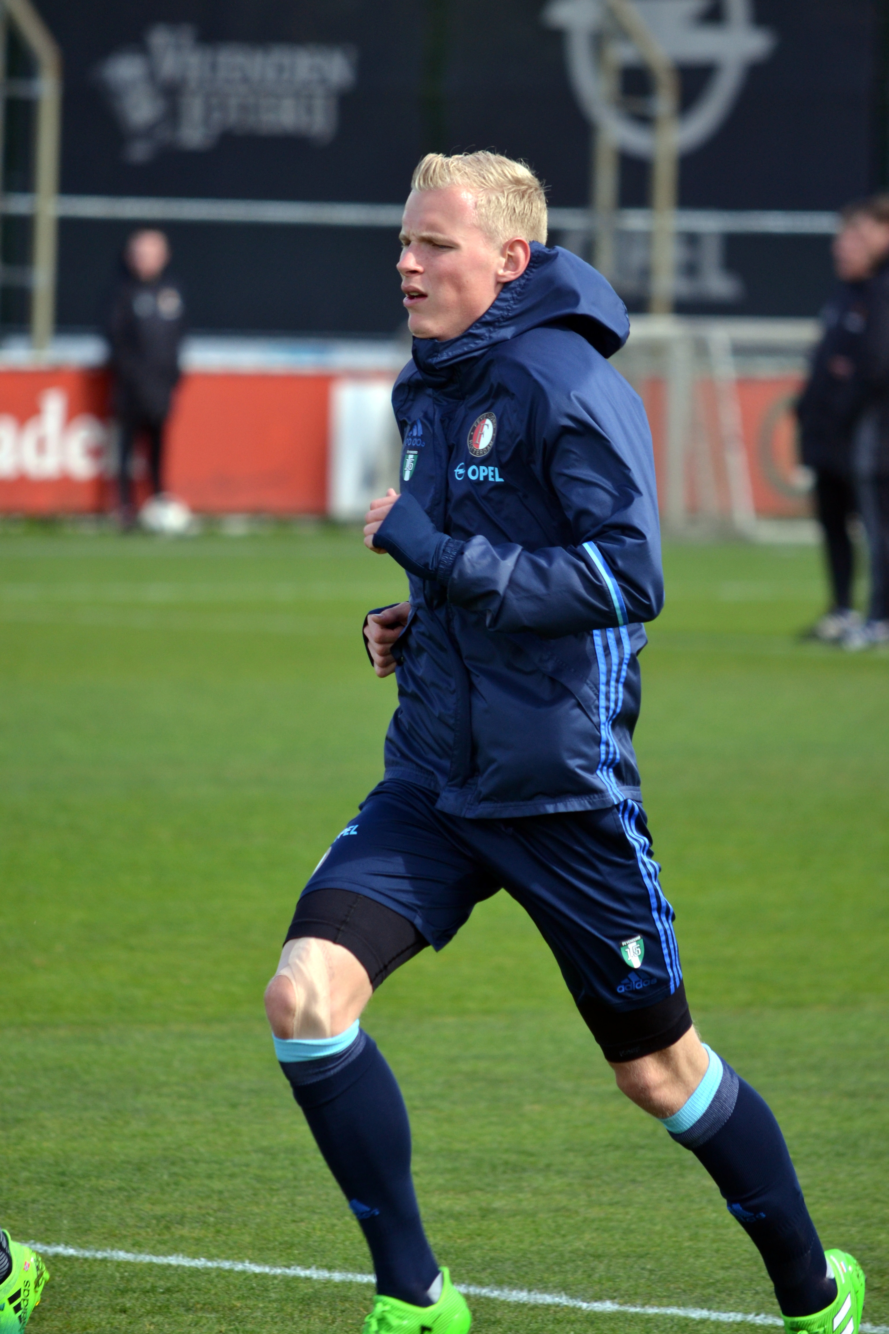 Deze foto is gemaakt tijdens een training van Feyenoord. This picture was taken during a training of Feyenoord.